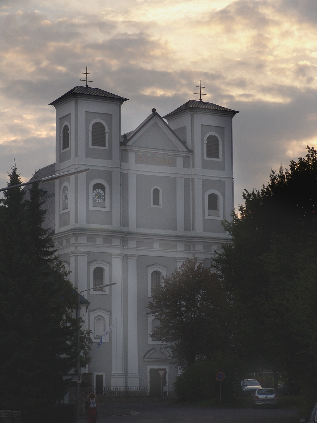 Wallfahrtskirche Maria Hilf in Fuchsmühl (2005) Fotograf: Walter J. Pilsak, Waldsassen Copyright Status: GNU Freie Dokumentationslizenz